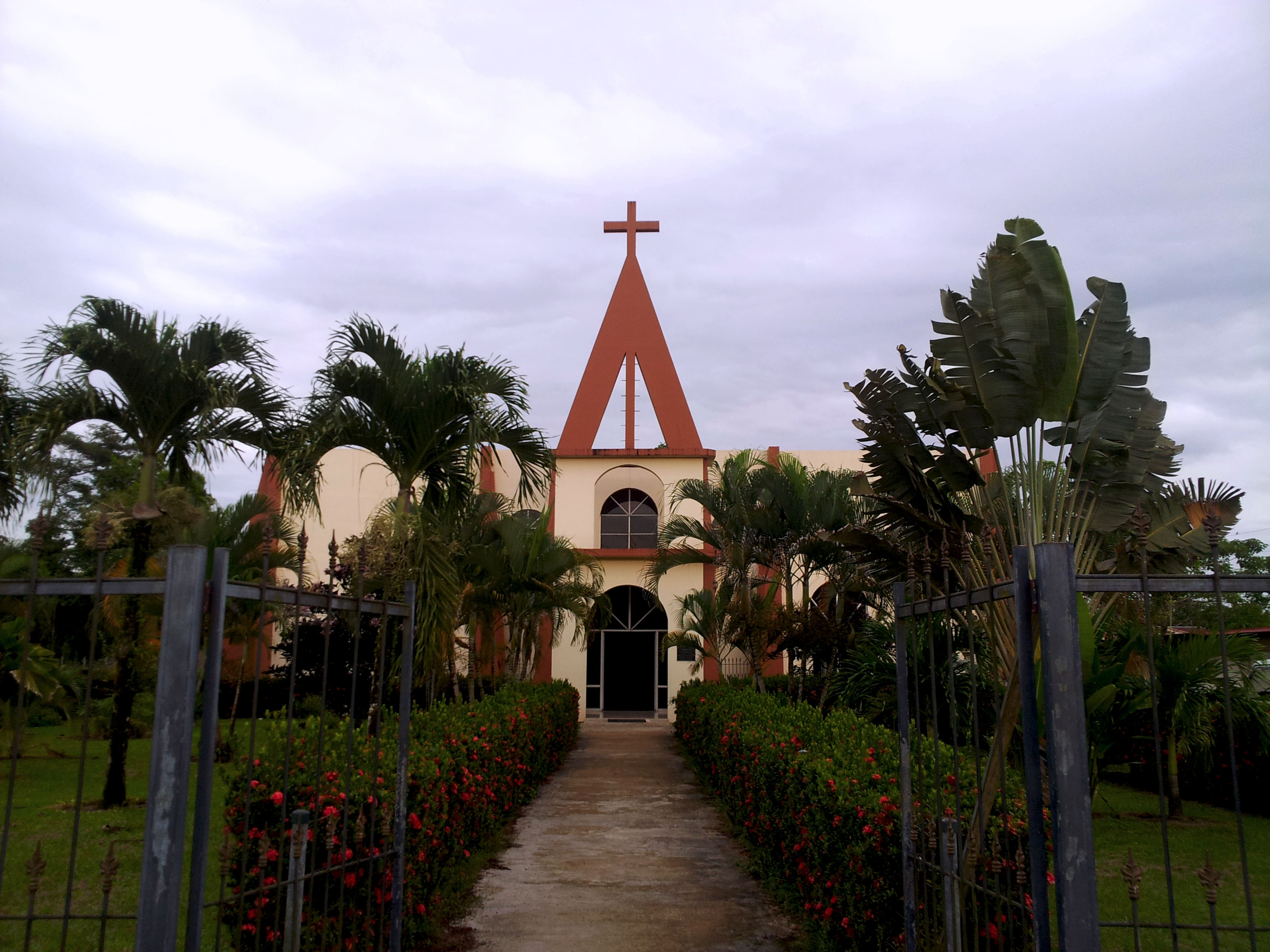 Iglesia de San Rafael de Guatuso. Costa Rica.